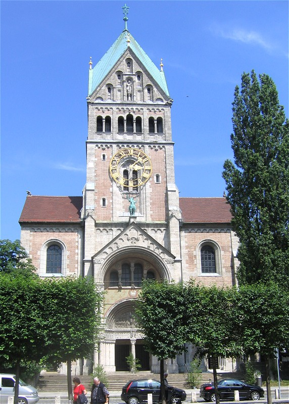 St._Anna Pfarrkirche in Muenchen